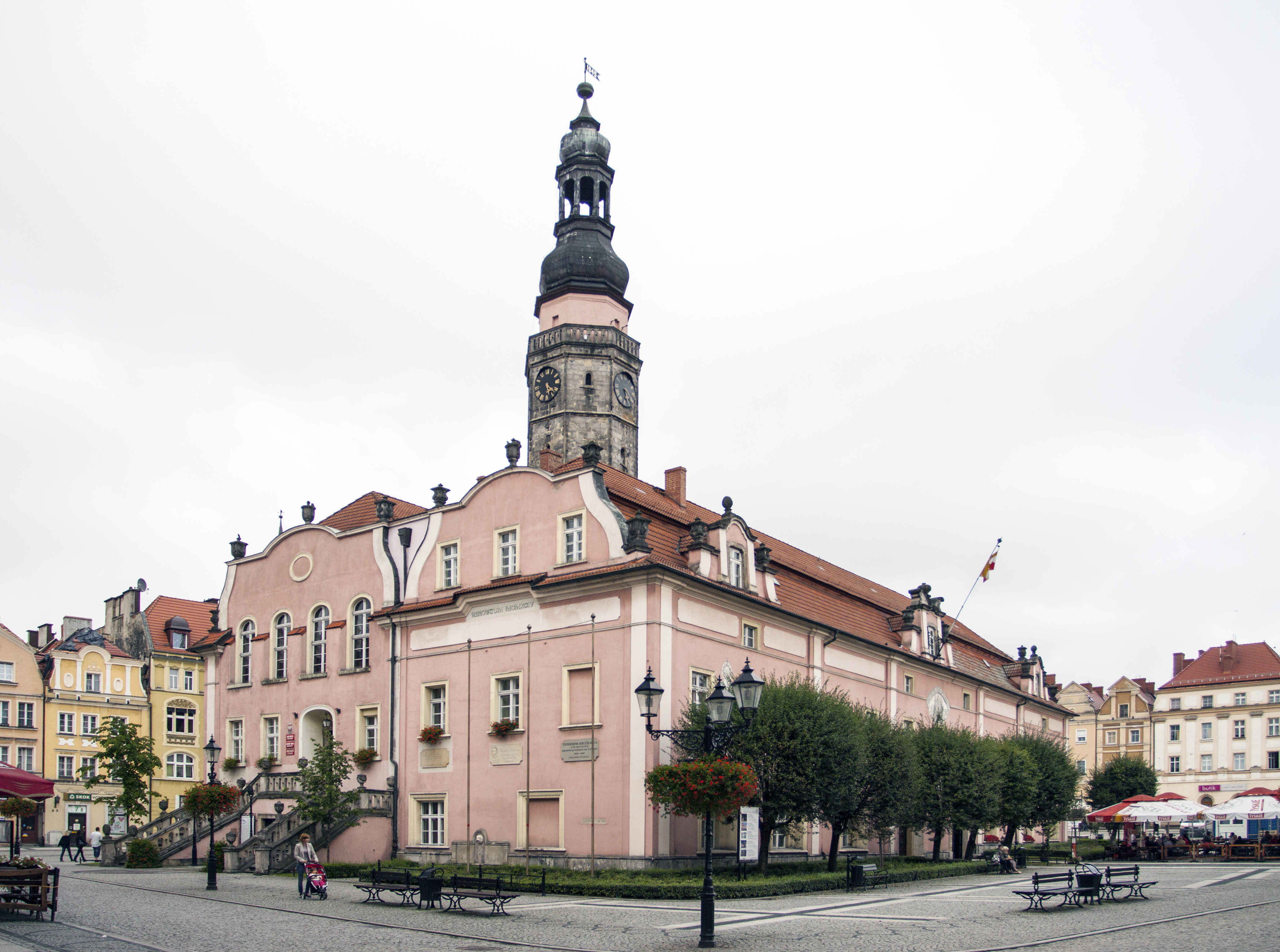 Bolesławiec Rynek 41 - Ratusz, 1525, 1781